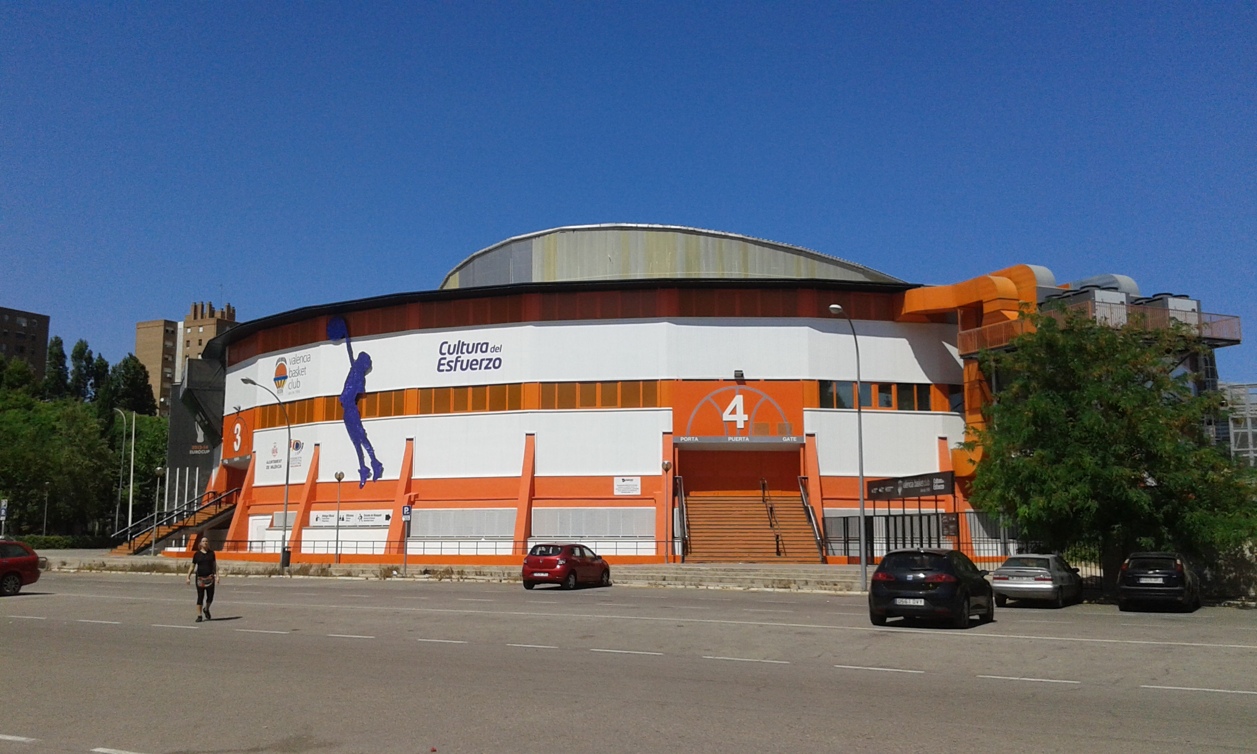 Pavelló Municipal Font de Sant Lluís